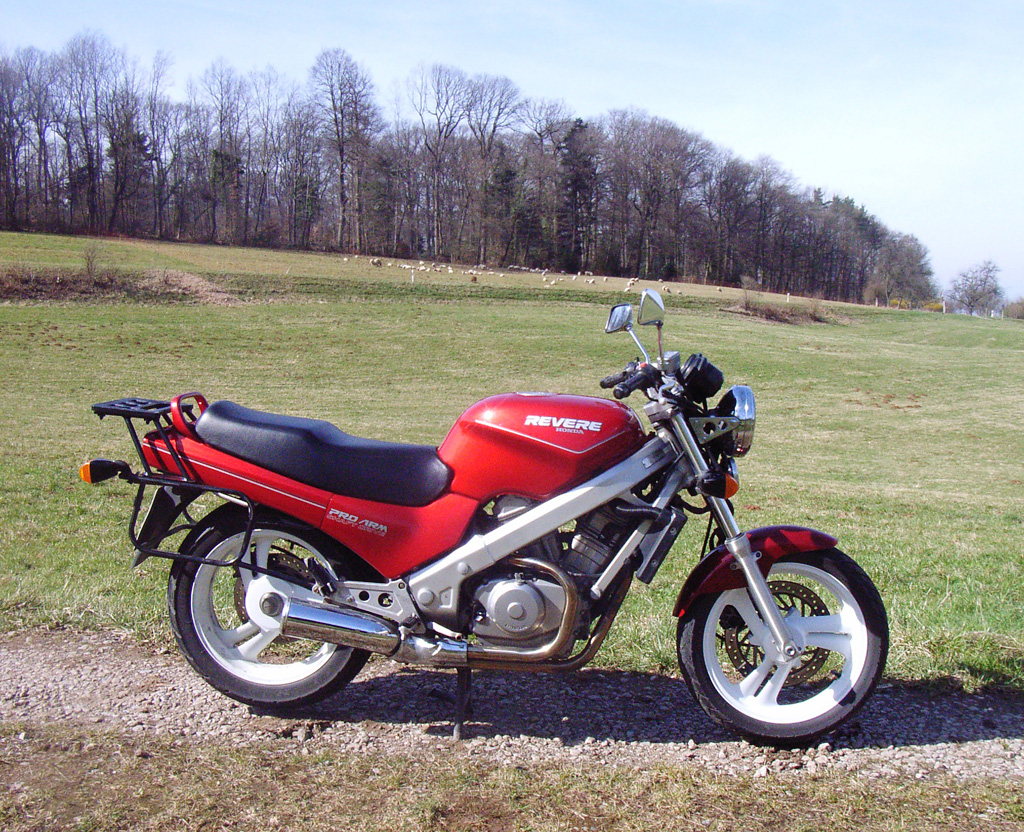 Honda NTV 650 Revere, 1991/92